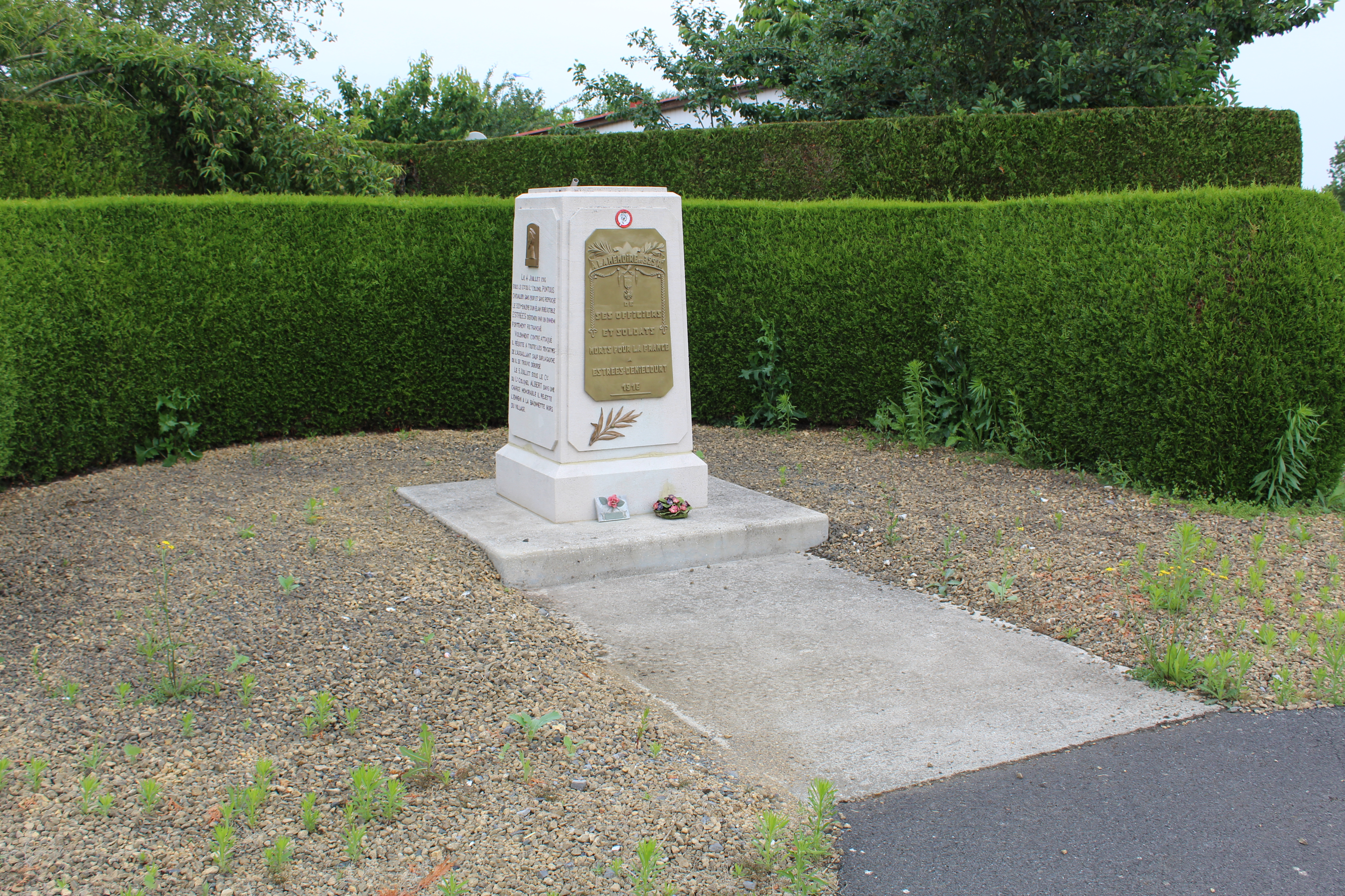 Stèle du 329è RI